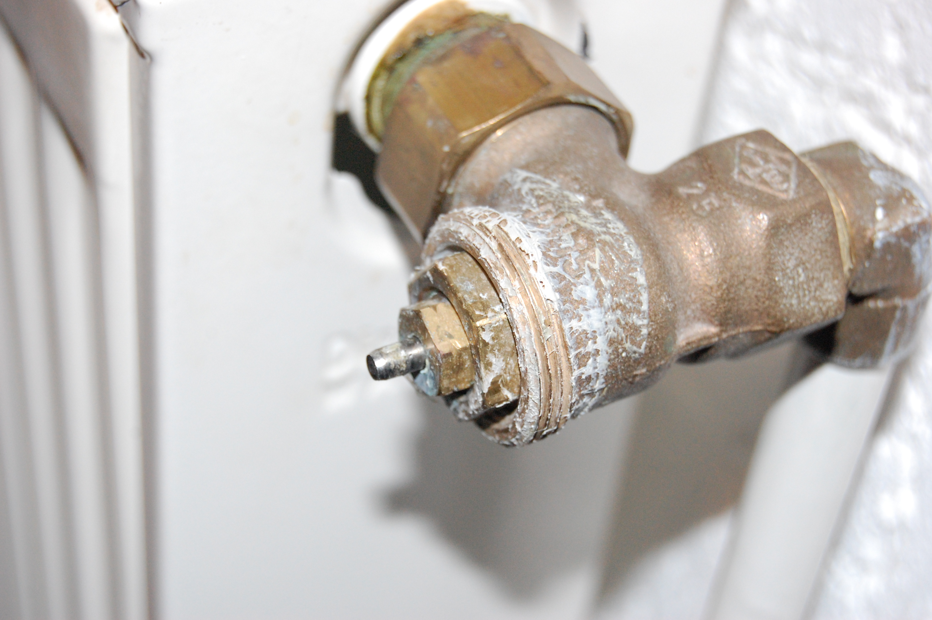 Ventil eines Heizkörpers